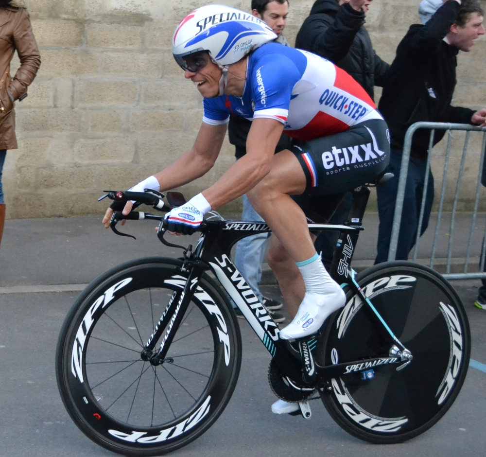 Sylvain Chavanel, champion de France du chrono.